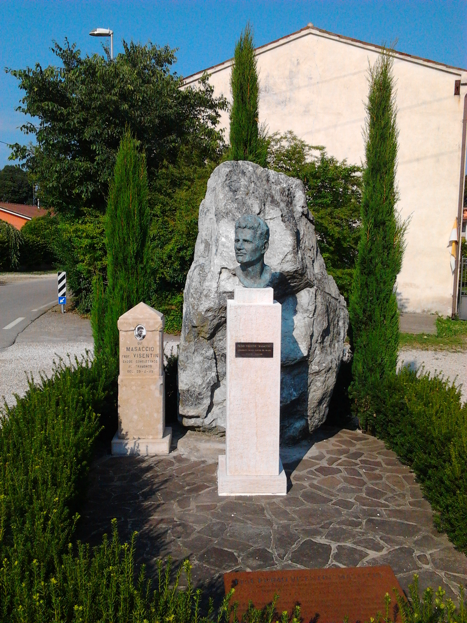 nuovo cippo e complesso monumentale